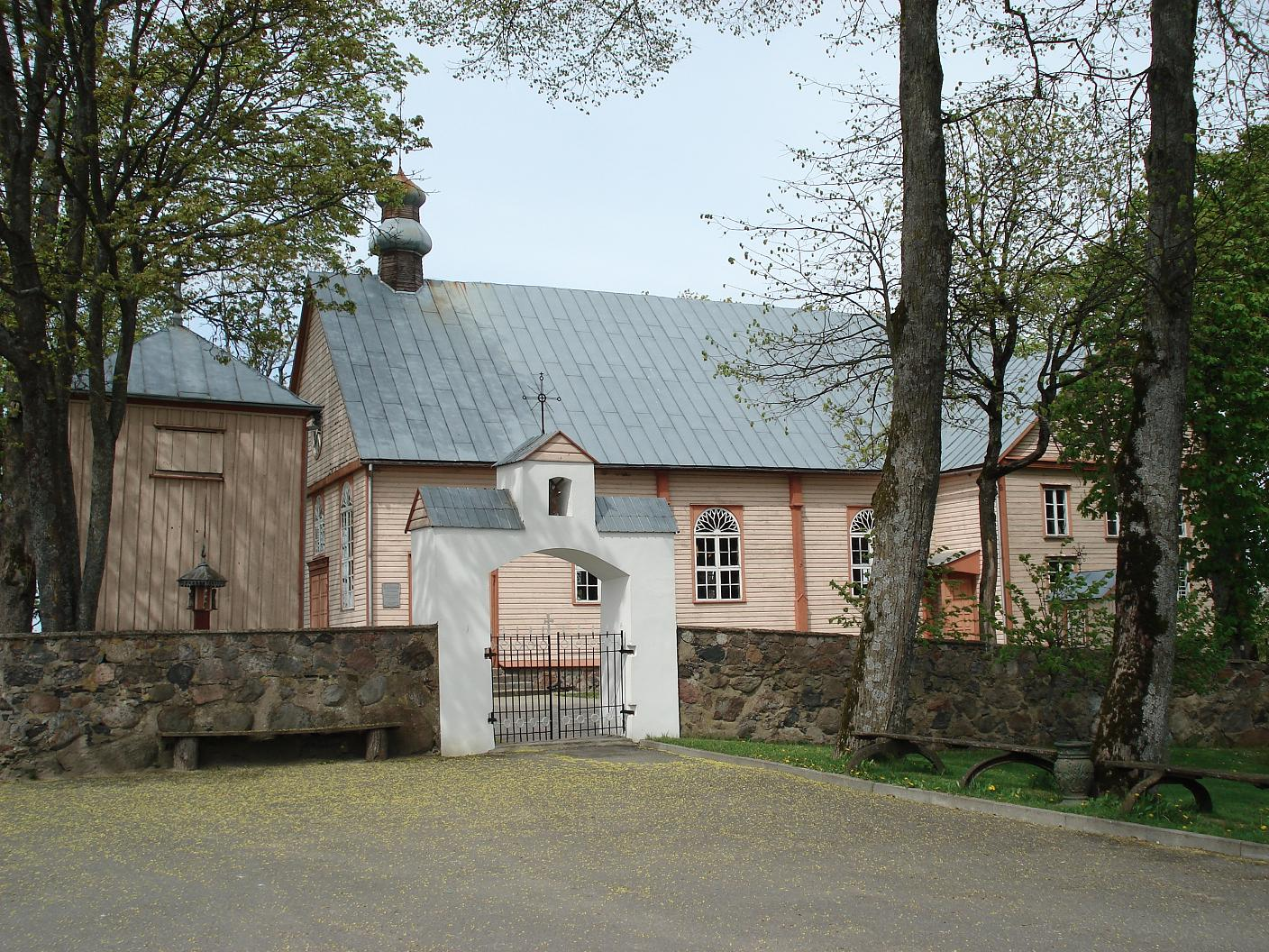 Upynos bažnyčia